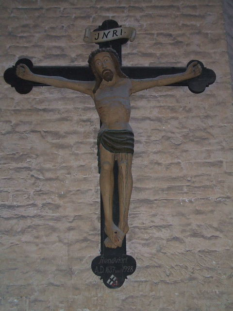 Stralsund, Germany, Jesus am Kreuz in der Marienkirche